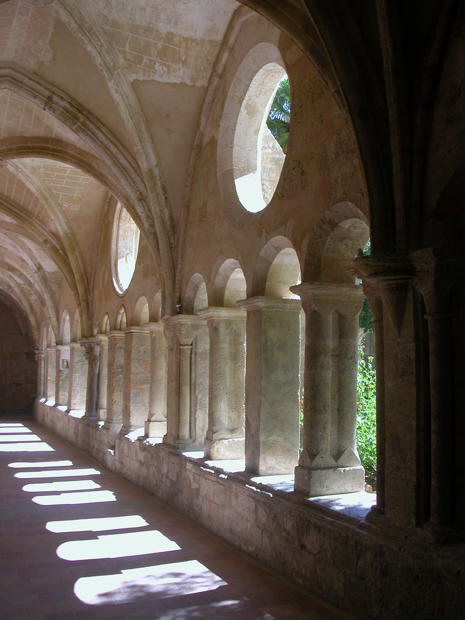 Abbaye de Valmagne - Photo personnelle.